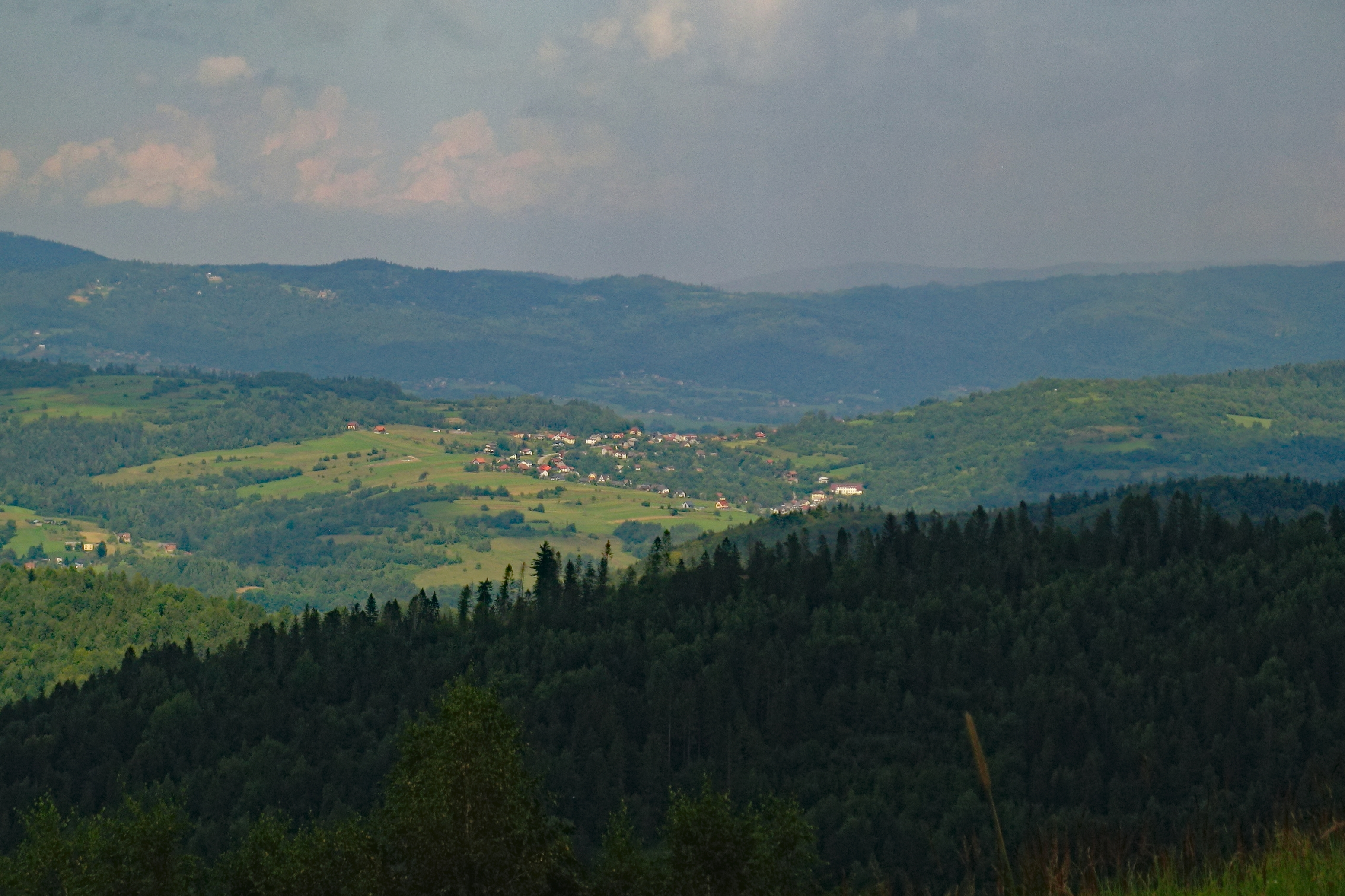 Rychwałdek pomiędzy Łyską z lewej a Barutką z prawej, w tle Jawornica (830 m n.p.m.), widok z Jastrzębicy (758 m n.p.m.)